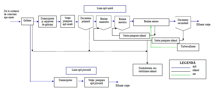 Schema unei statii de epurare